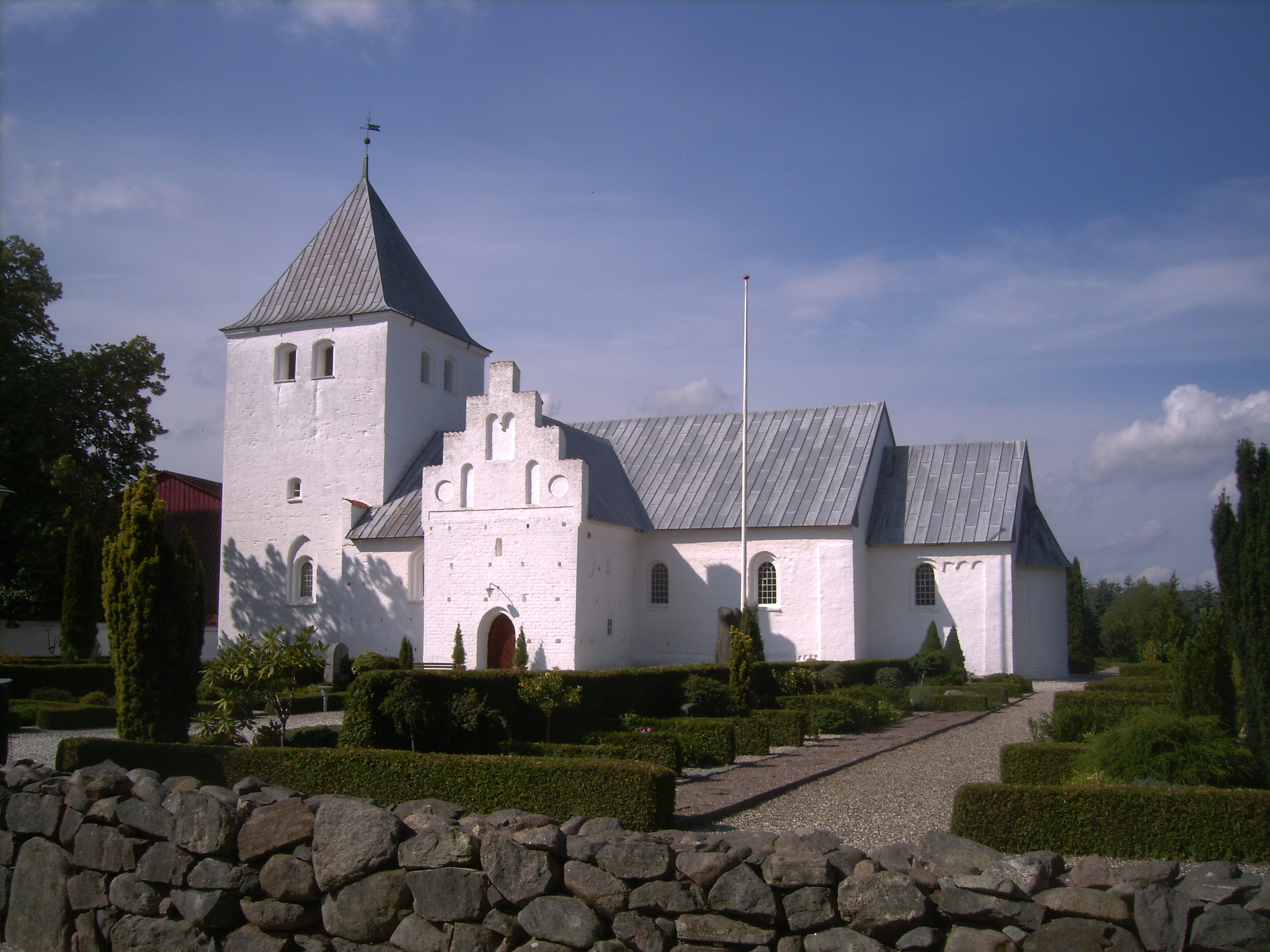 Estruplund Kirke,Rougsø Kommune